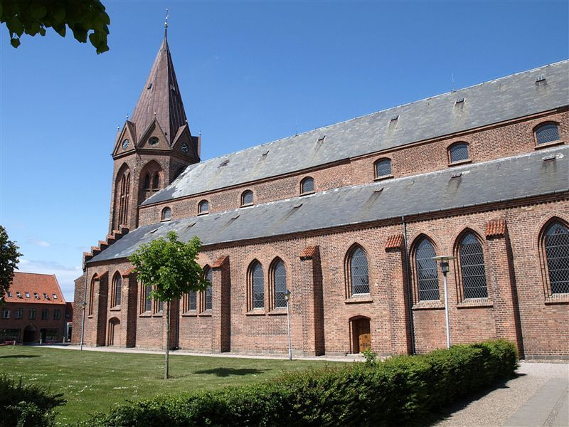 Assens Kirke i Danmark. Assens kirke